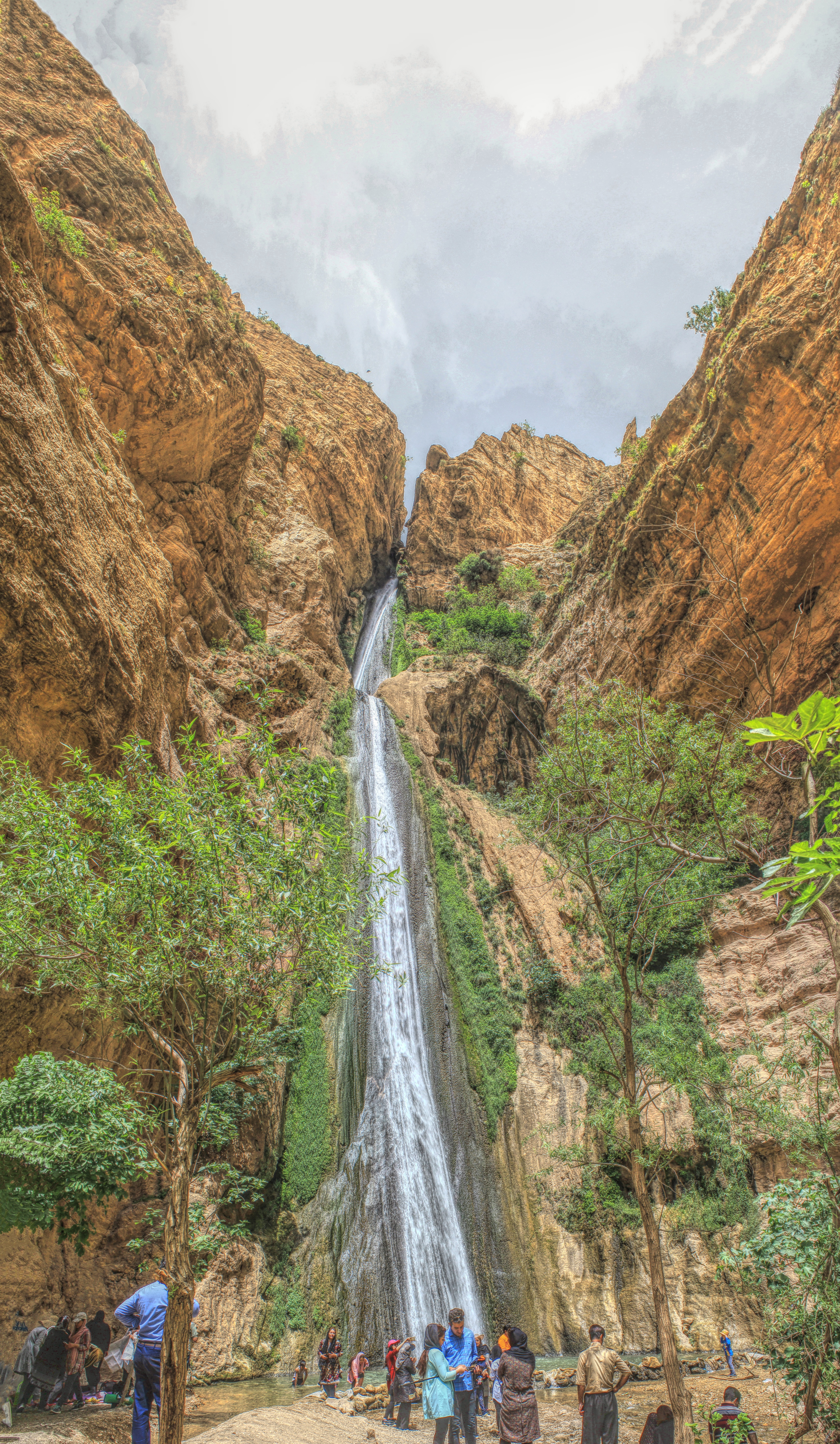 آبشار پیران